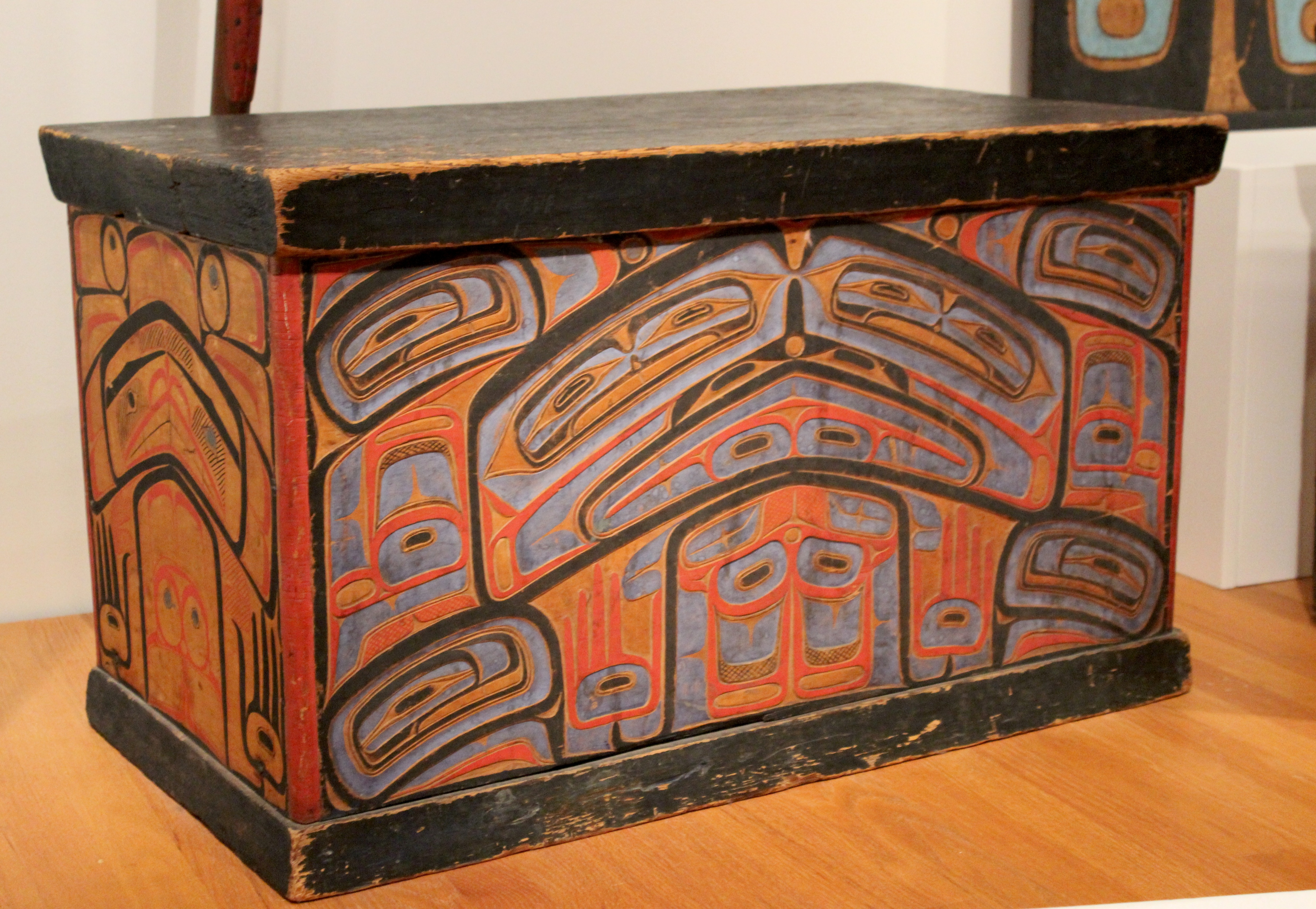 Arca Heiltsuk. Seattle Museum of Art.